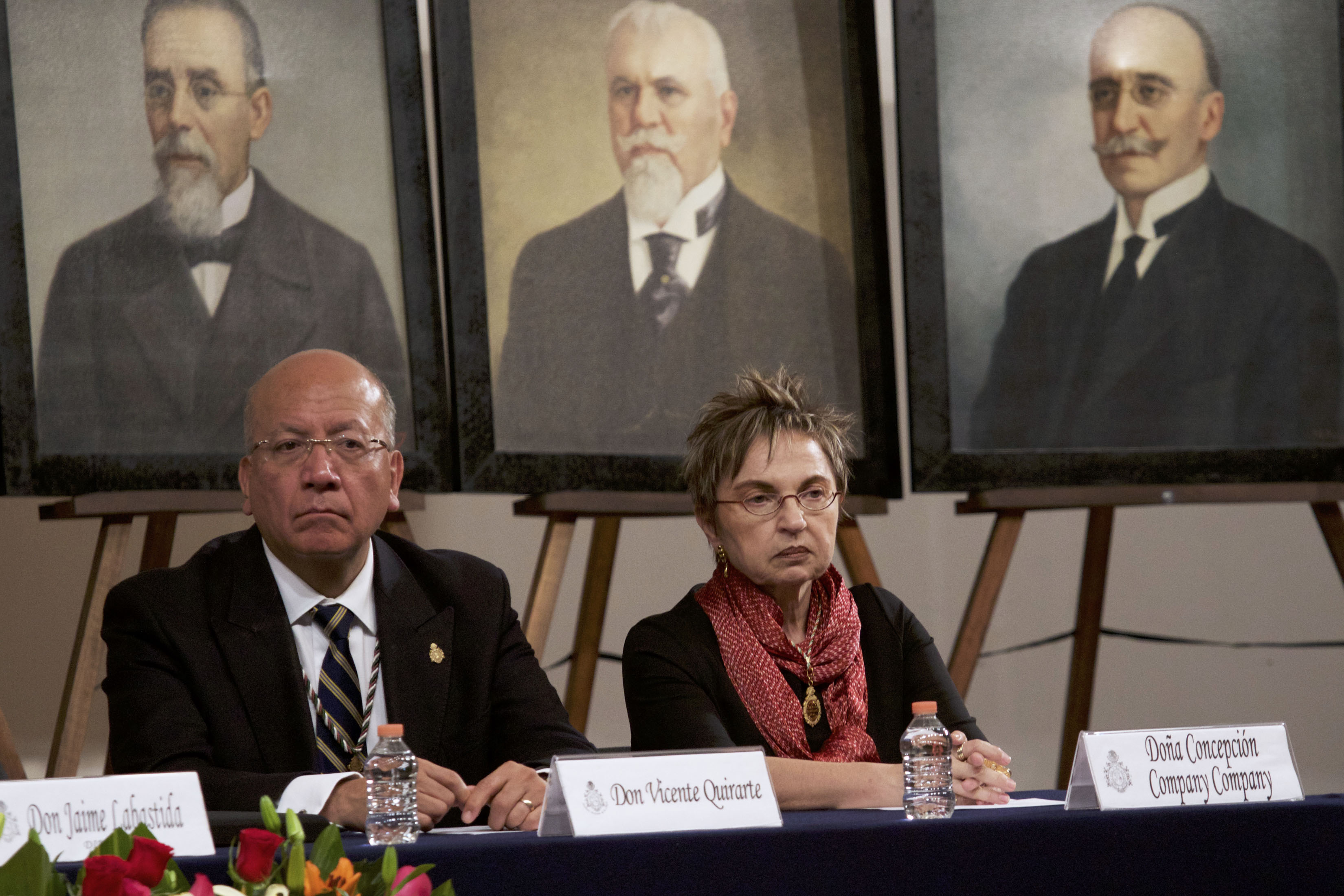 Jueves 26 de abril de 2018. En la Sala Manuel M. Ponce del Palacio de Bellas Artes se realizó la ceremonia de ingreso a la Academia Mexicana de la Lengua, del maestro Enrique Fernando Nava López como académico de número XXIII. En dicha ceremonia estuvo presente Adolfo Castañón; Jaime Labastida, quien fue encargado de responder el discurso de ingreso; Vicente Quirarte y Concepción Company Company. Fotografía: Milton Martínez / Secretaría de Cultura CDMX.